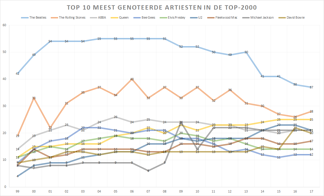 Top 10 van de artiesten met de meeste noteringen in de Top-2000 over 19 jaar in Nederland